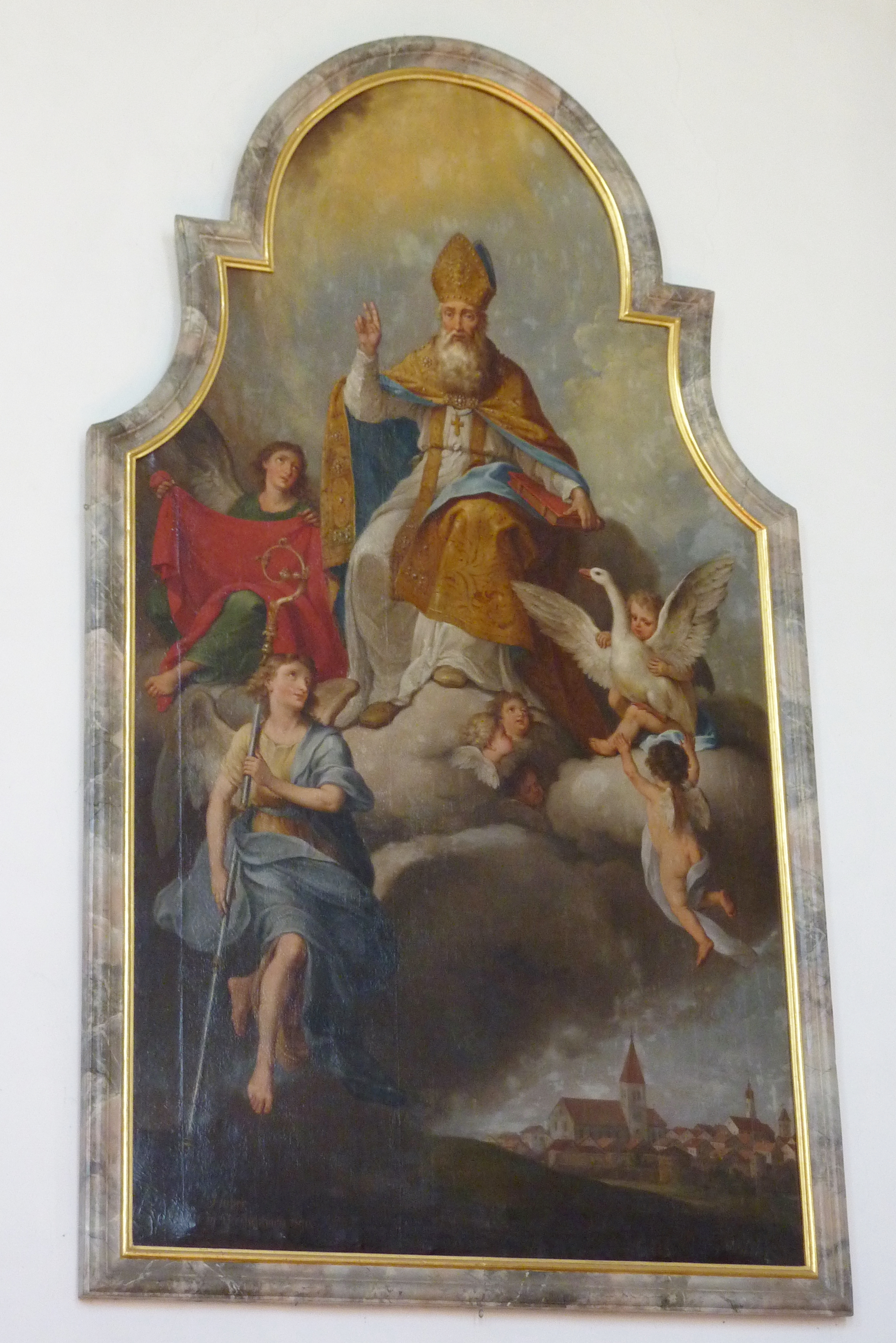 Katholische Stadtpfarrkirche St. Martin in Gundelfingen an der Donau im Landkreis Dillingen an der Donau (Bayern), Gemälde von Konrad Huber von 1810, Darstellung: hl. Martin